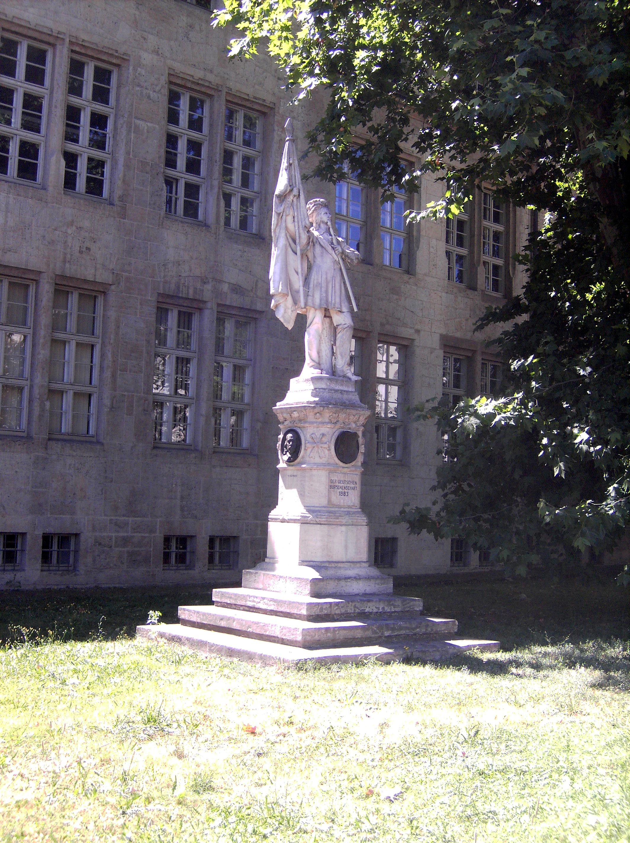 Urbuschenschaftsdenkmal in Jena, Denkmal für die Urburschenschaft und ihre Gründer errichtet auf dem Eichplatz am 2. August 1883, seit September 1951 vor dem Universitätshauptgebäude in Jena